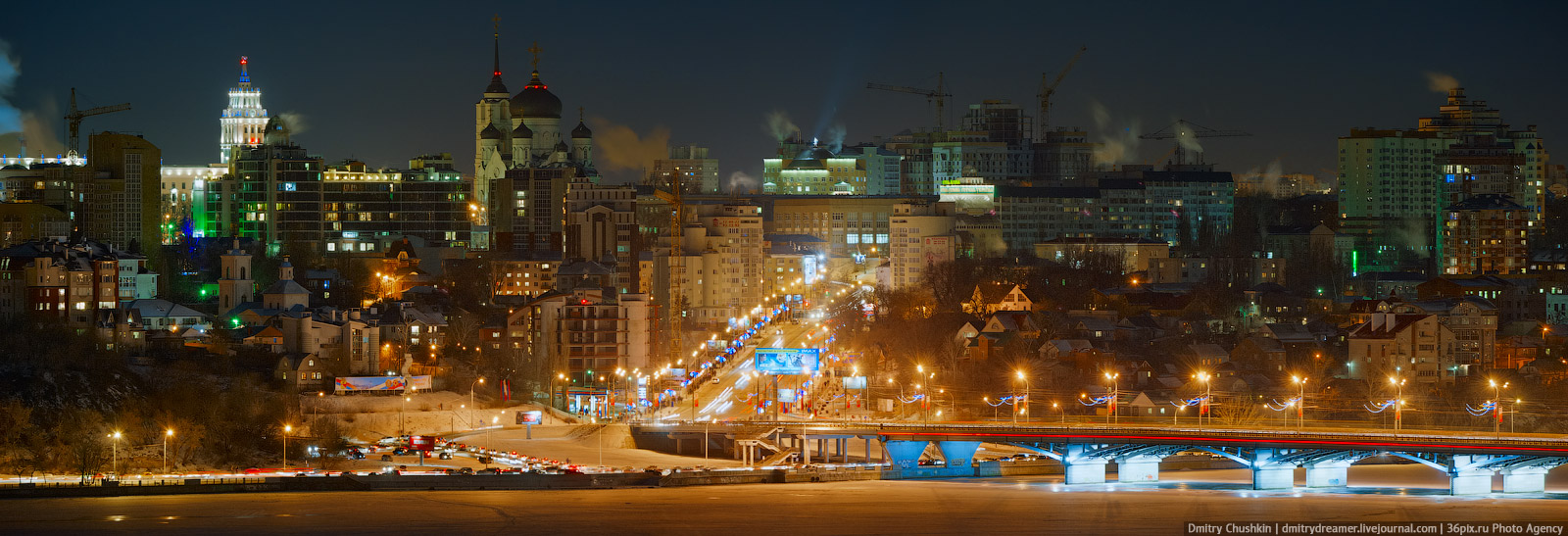 Панорама Центрального района